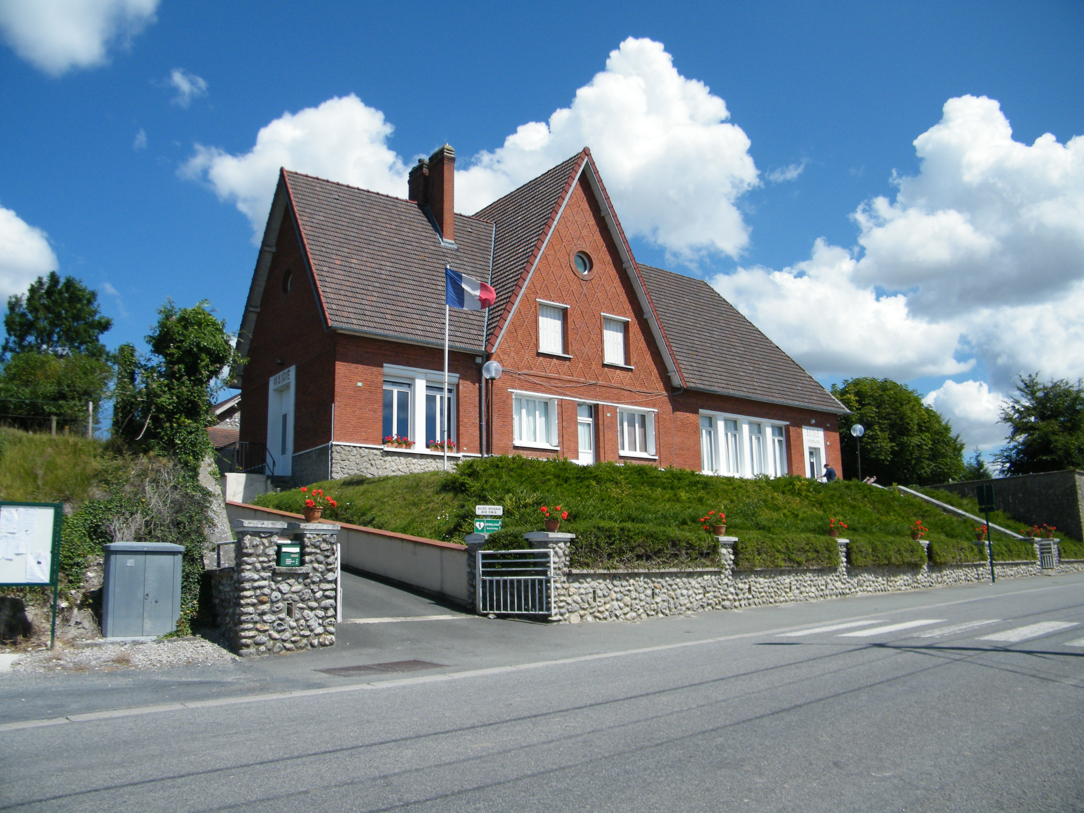 Clais, Seine-Maritime, France, mairie-école